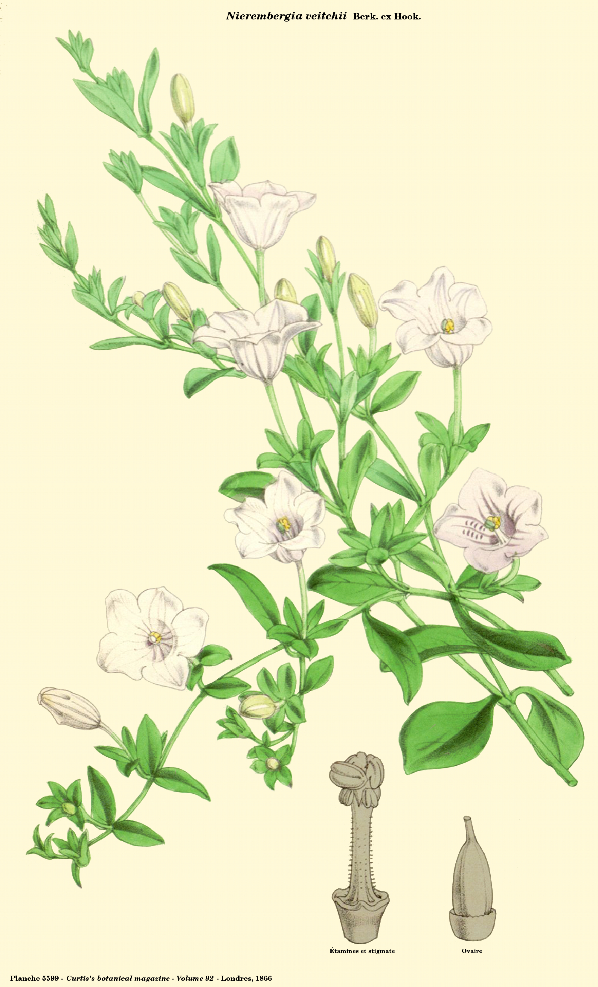 Nierembergia veitchii - Planche 5599 du Curtis's botanical magazine - Gravure de Fitch - Londres, 1866 - Reprise par D. Prévôt sous Gimp